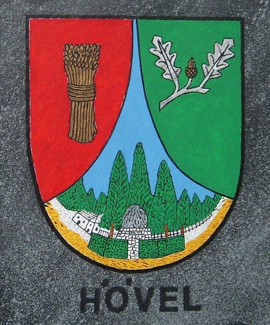 Schiefertafel als Ortswappen von Hövel, angefertigt von Richard Lenzgen